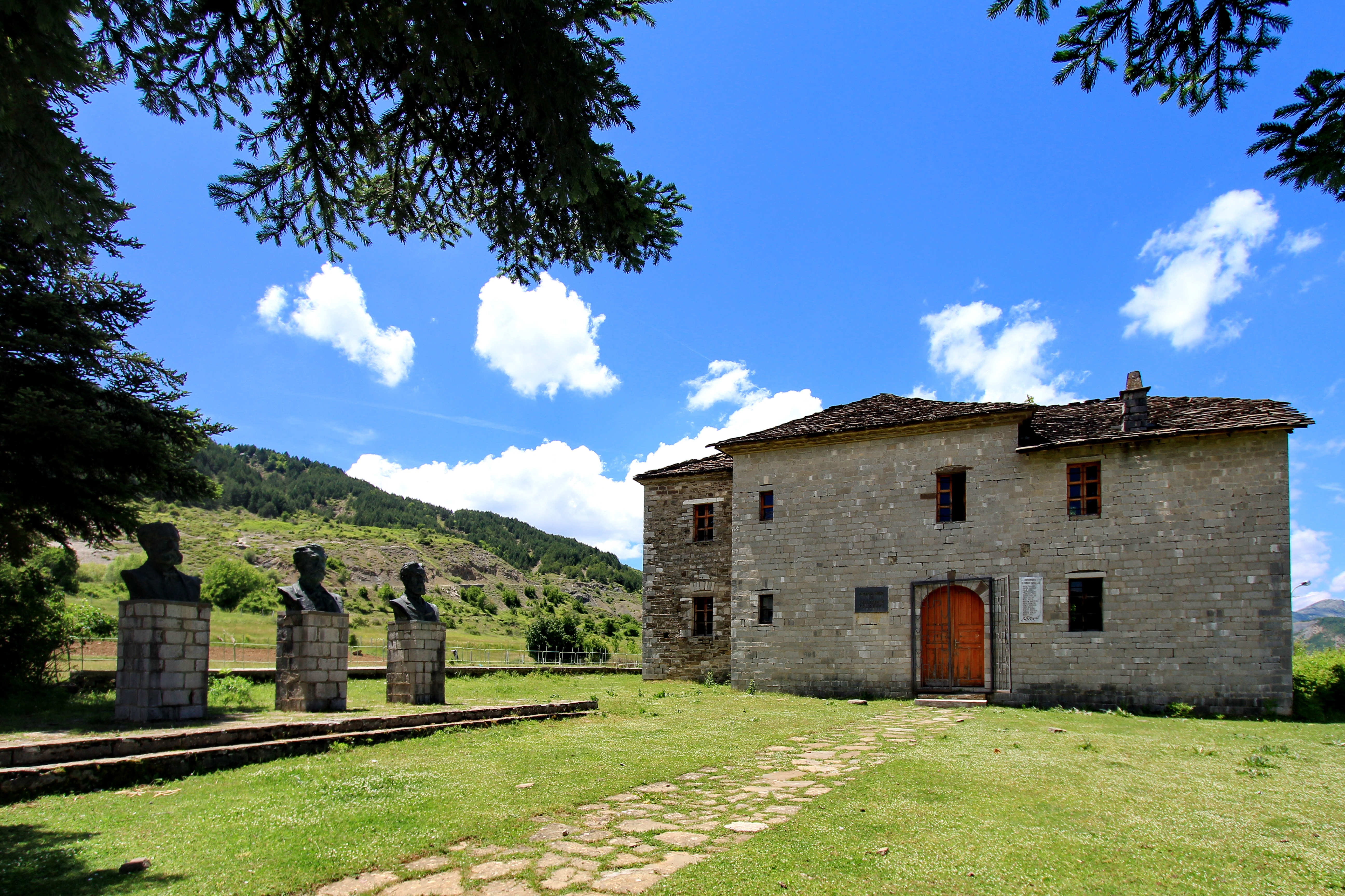 Banesa e Vëllazërisë Frashëri